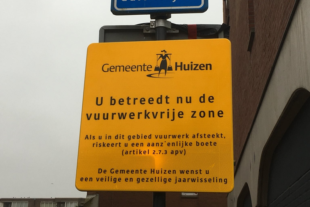 Bord voor een vuurwerkvrije zone in de gemeente Huizen. Deze borden hangen in winkelcentrum Oostermeent (sinds jaarwisseling 2015/2016) en in winkelcentrum Holleblok (sinds jaarwisseling 2016/2017). Op basis van APV bepaling is het niet toegestaan vuurwerk af te steken in dit gebied.